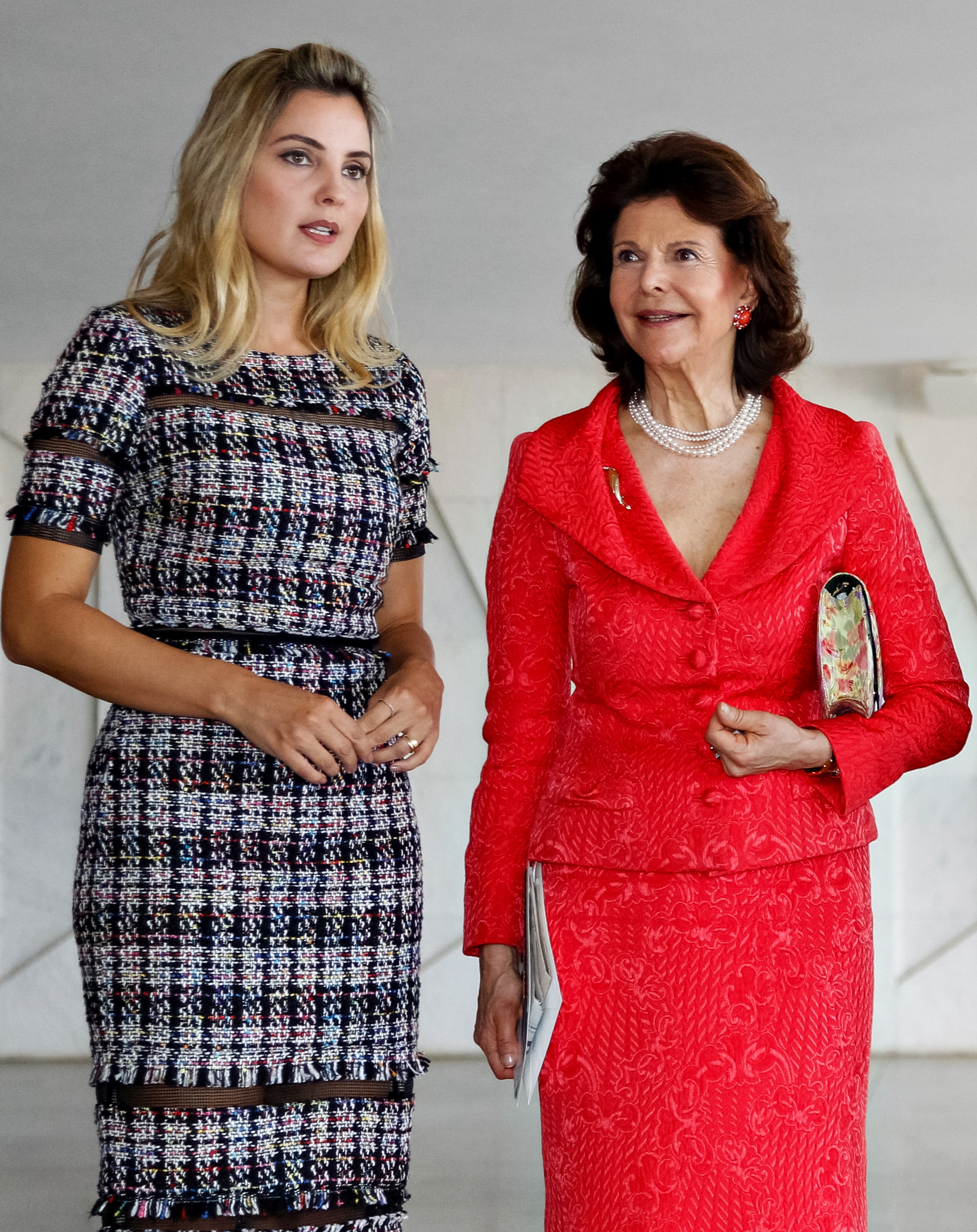 Marcela Temer recebe a Rainha Sílvia da Suécia